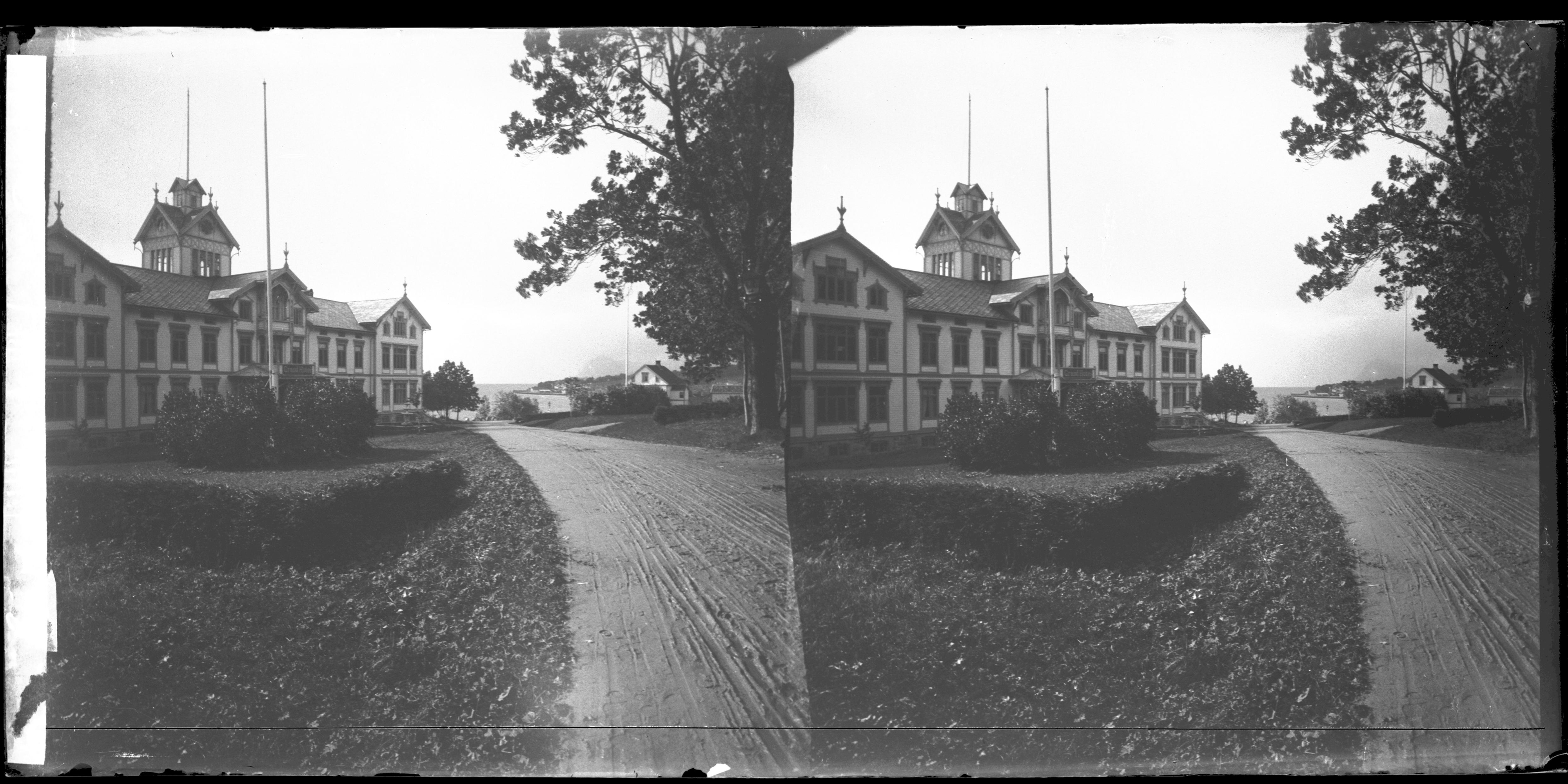 Grand Hotel, Molde.